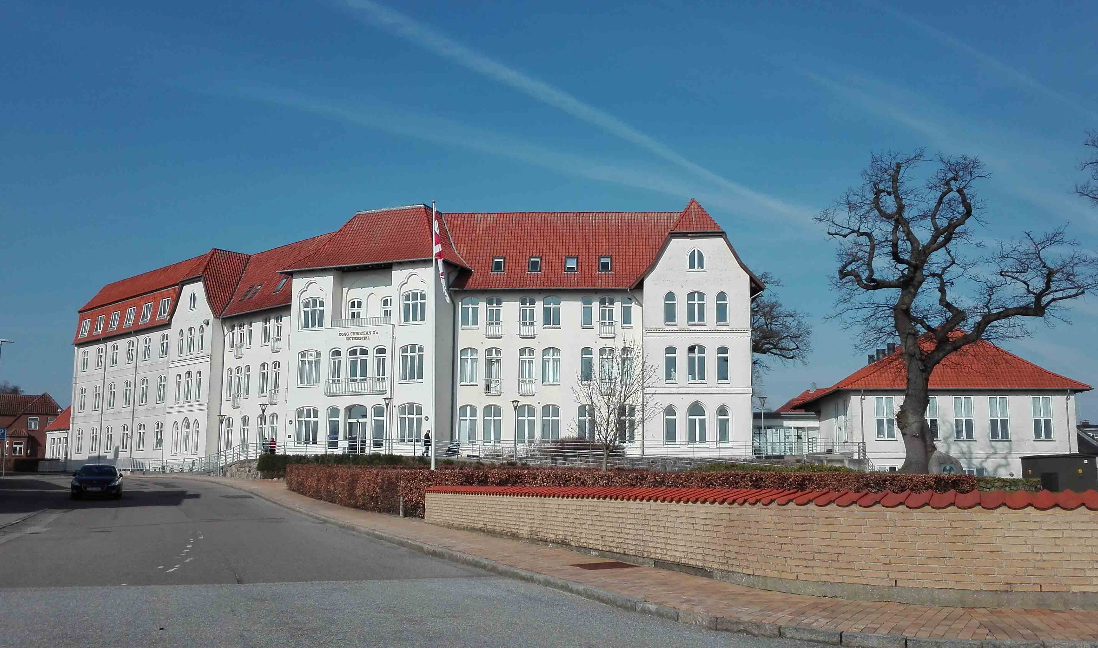 Kong Christian X's Gigthospital i Gråsten